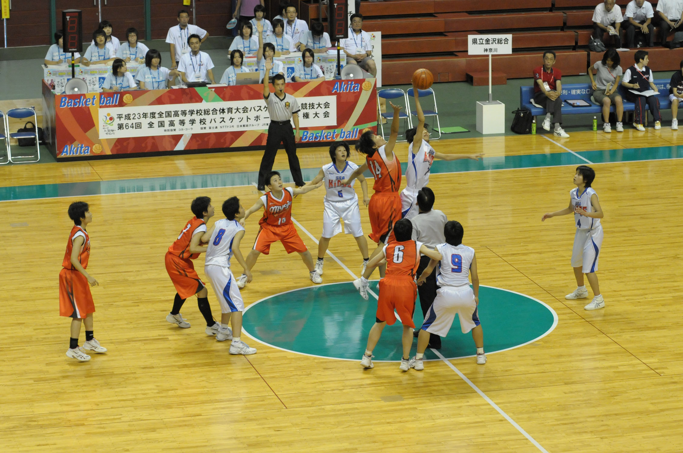 明星学園対金沢総合高校。秋田市立体育館で。